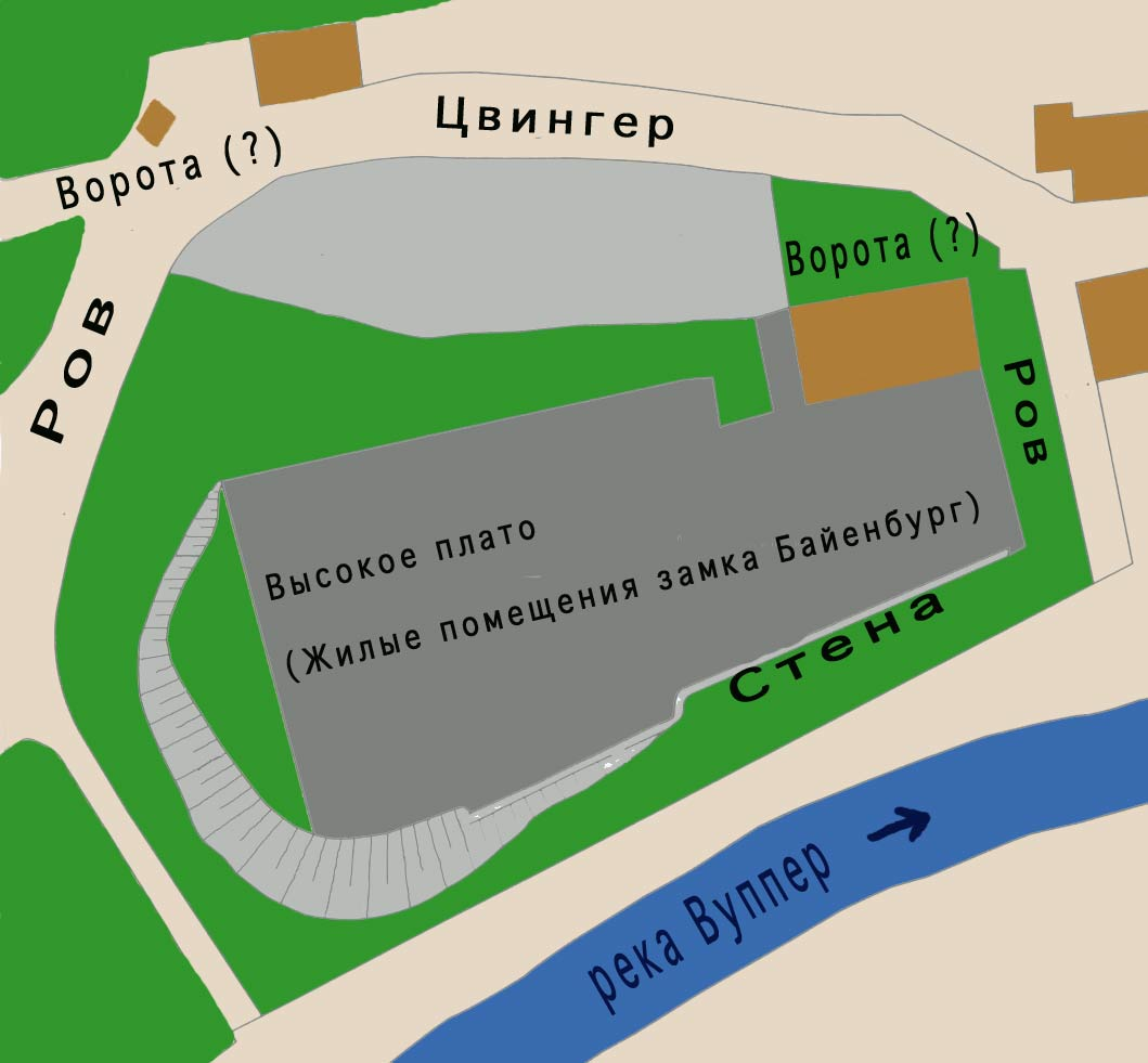 Das Burgareal in Beyenburg:Grundriß nach der Urkatasterflürkarte von 1827 ru: Рисунок расположения замка Байенбург по карте 1827 года